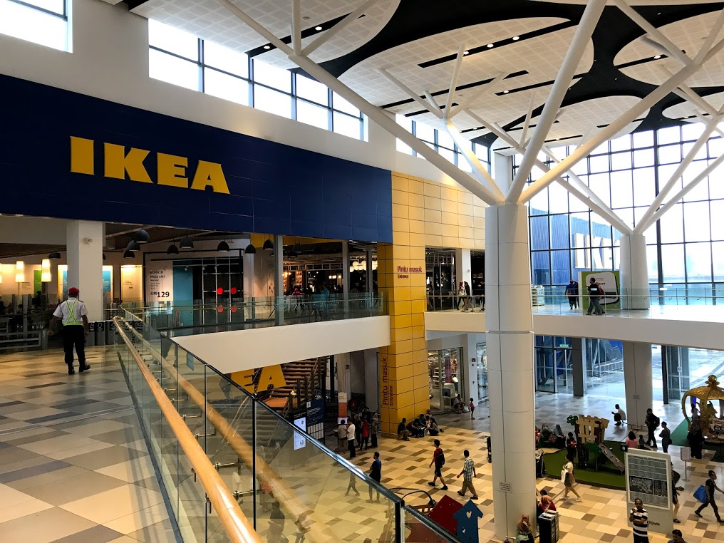 mytown ikea entrance